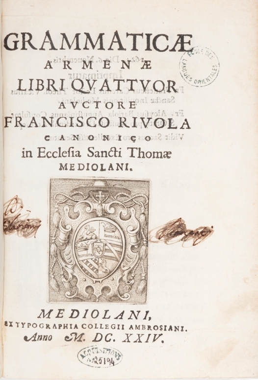 Grammaticae Armenae libri quattuor